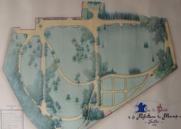 Le plan du parc de la préfecture, reproduction en couleur réalisée en 1861 par Paul Coulot de Lavenne. Original visible dans les fonds anciens de la Médiathèque Louis-Aragon.